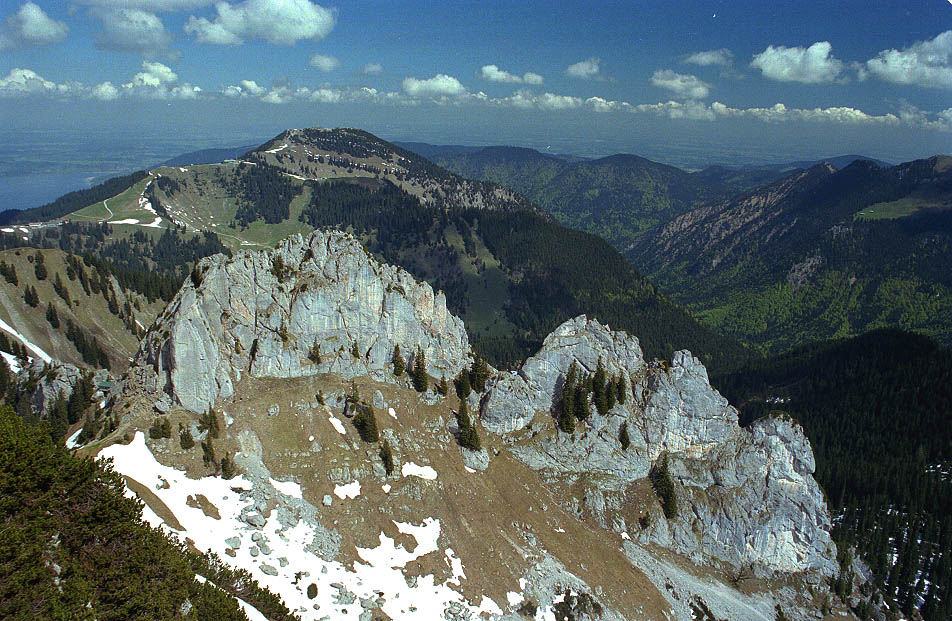 Plankenstein vom Risserkogel, Bayerische Voralpen, selbst fotografiert, GNU-FDL